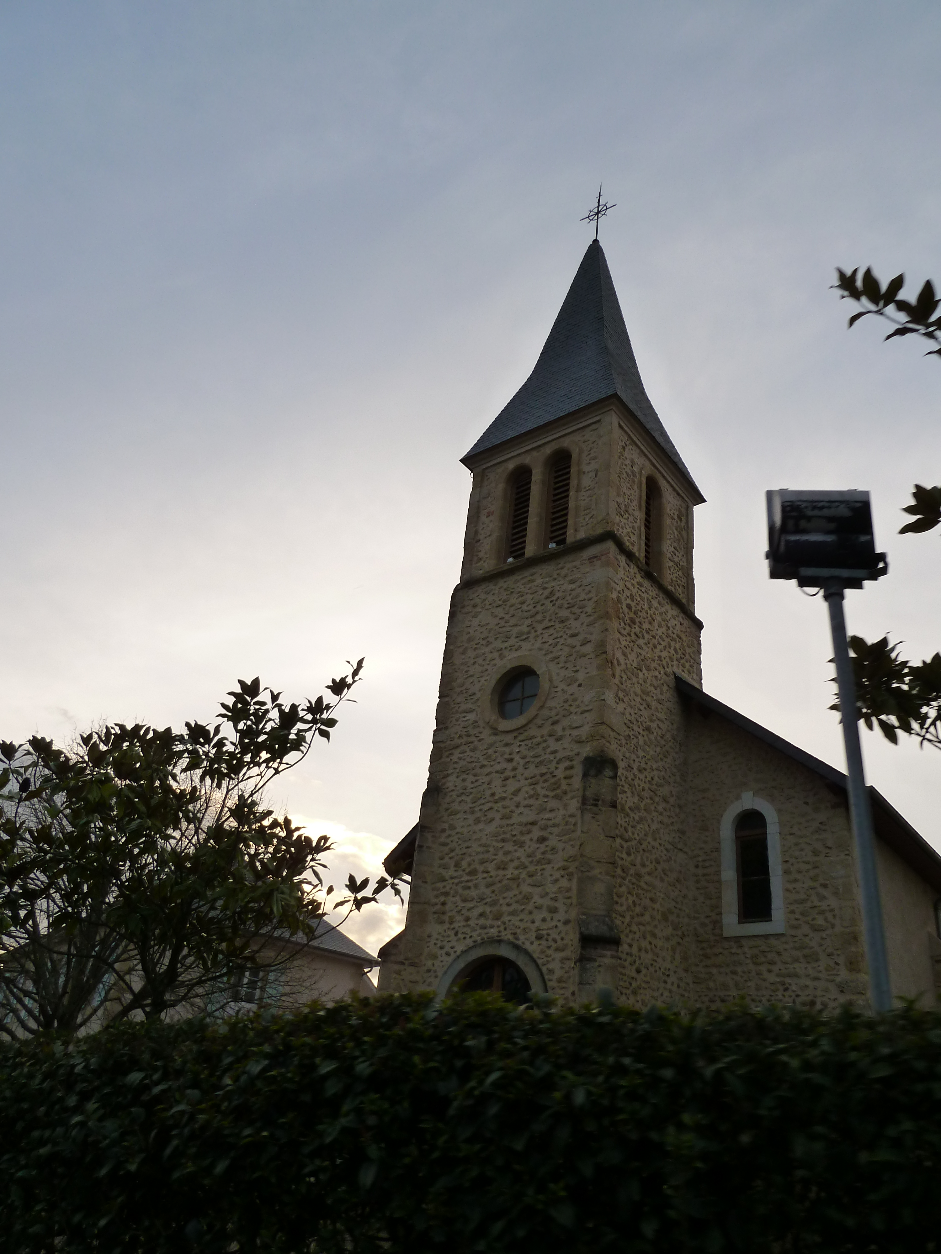 Église de Vignes (Pyrénées-Atlantiques)